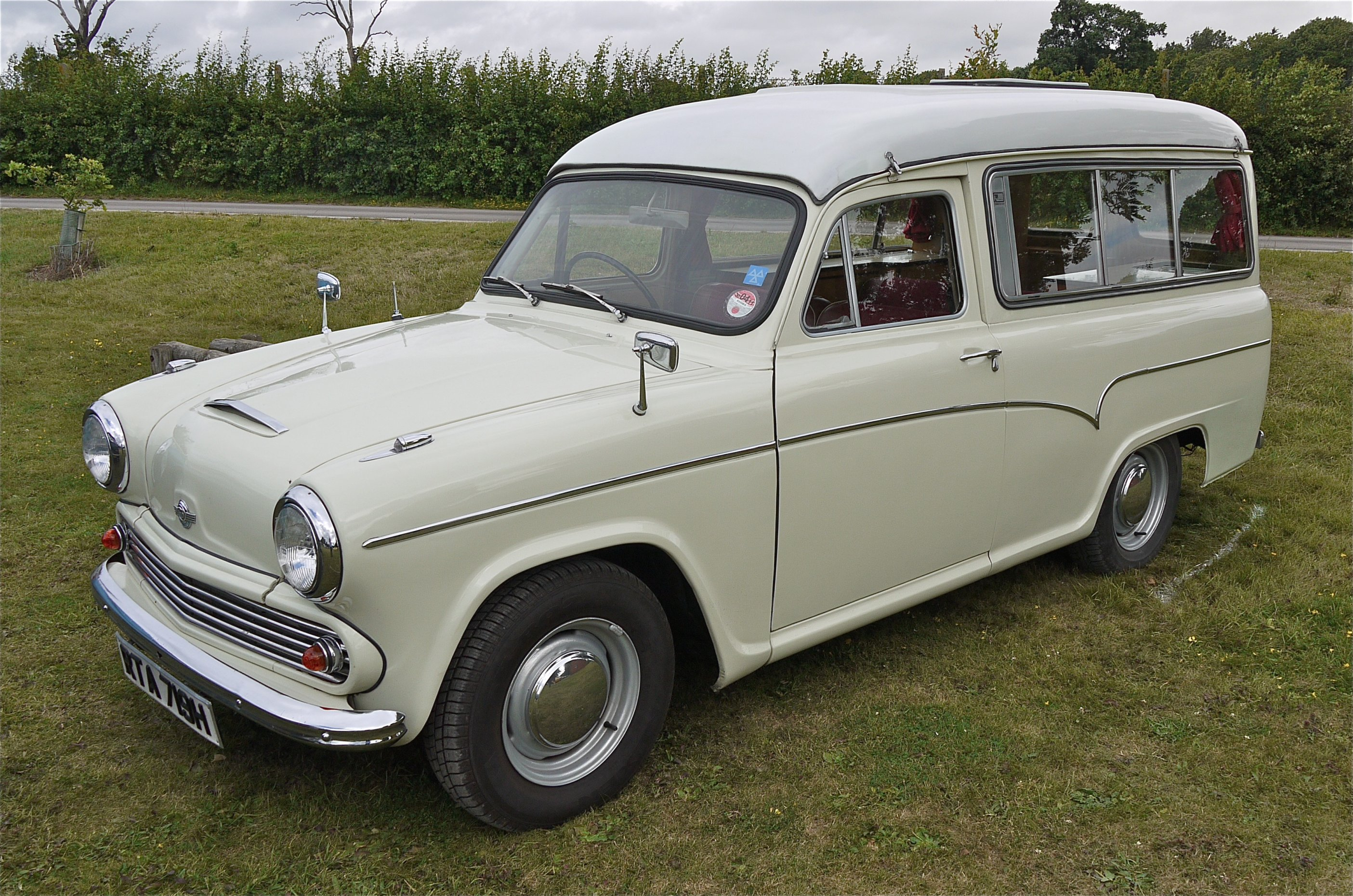 Panasonic G1 14-45 Lens